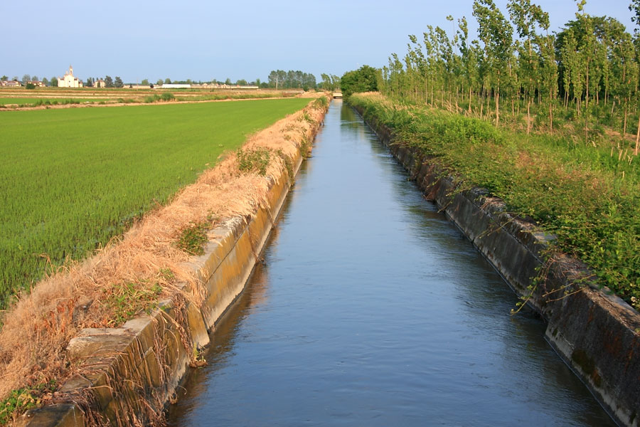 Il Cavo Panizzina nei pressi di Vespolate (NO)